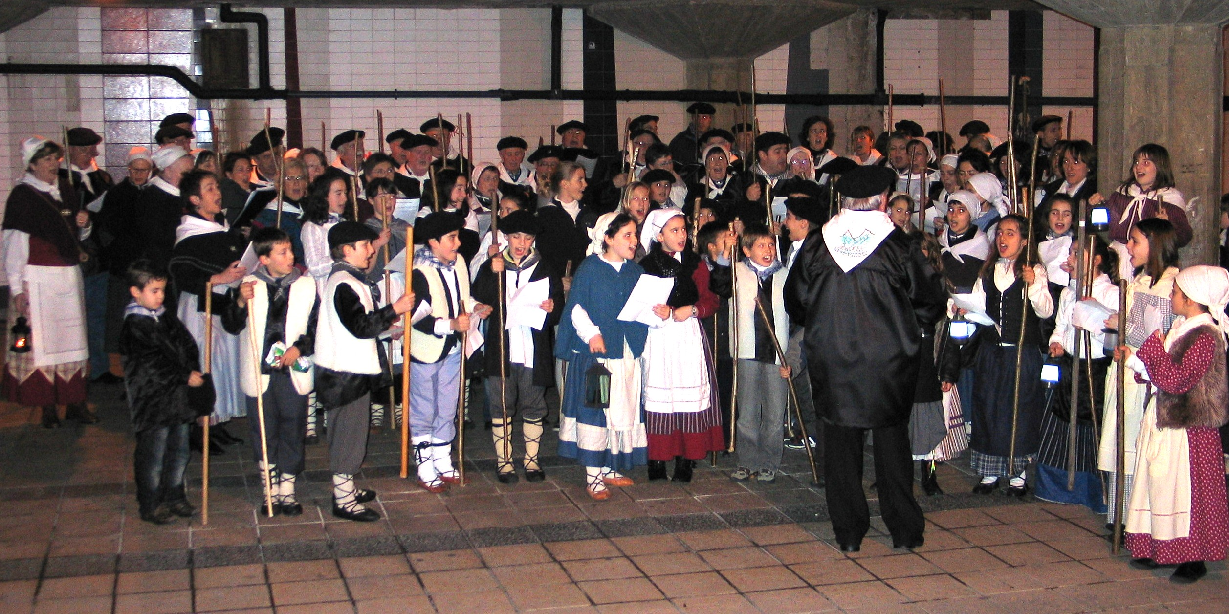 Ibaeta auzoan gazteak eta helduak ateratzen dira.